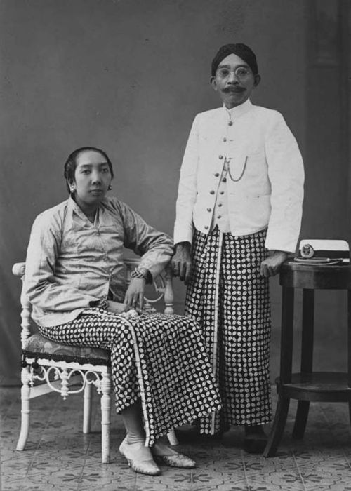 Foto. Raden Toemenggoeng Danoediningrat, de regent van Kediri, met zijn vrouw